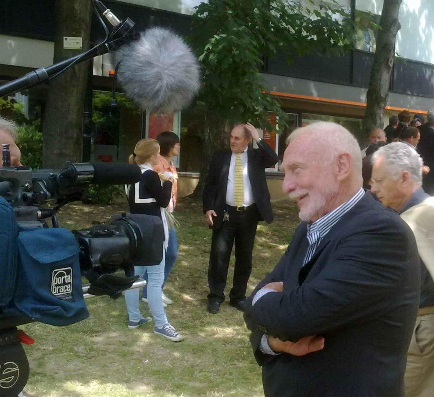 Josy Dubié lors de l'inauguration du monument de Salavador Allende à l'ULB en juin 2014.